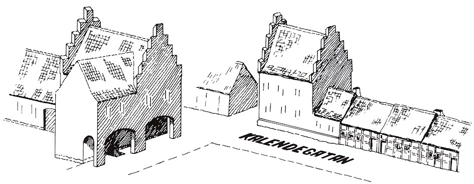 Ärkebiskopsgården från 1400-talet i Malmö. Rekonstruktion: Sven Rosborn.